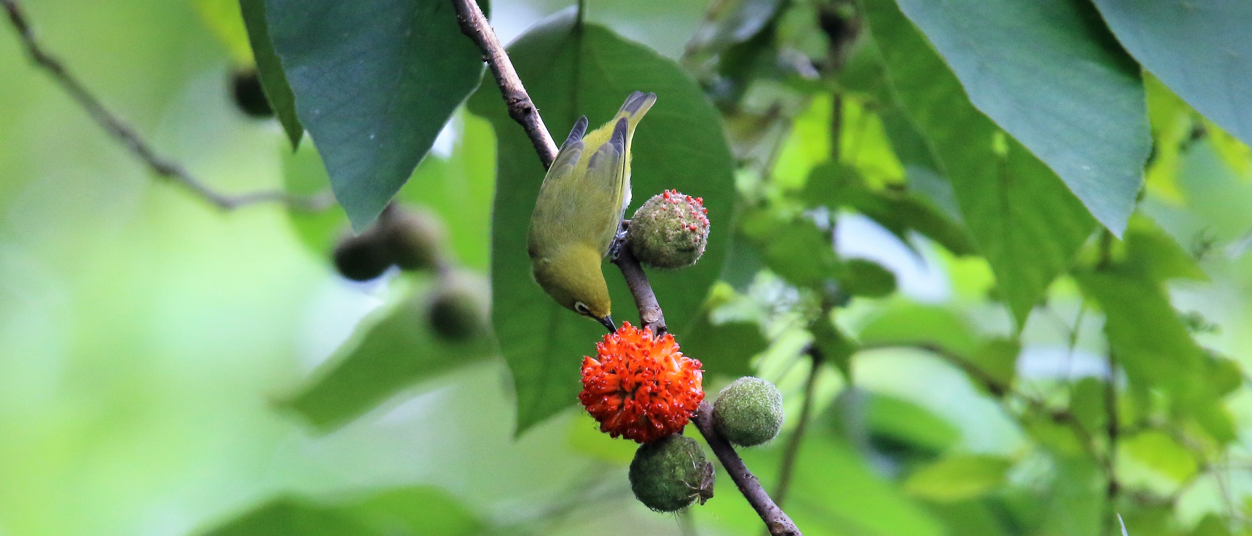 Paper mulberry